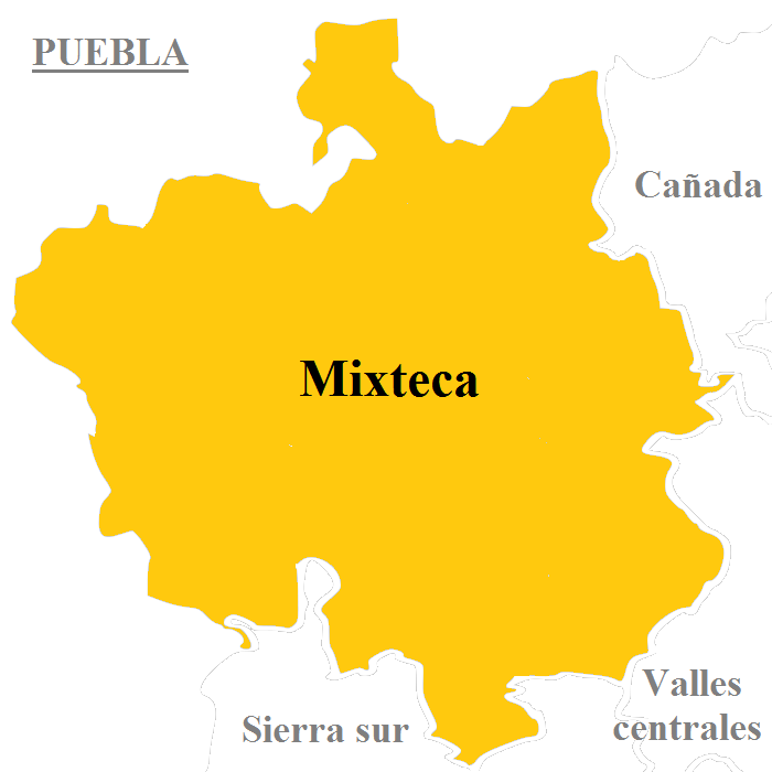 Región Mixteca, una de las ocho regiones que conforman al estado mexicano de Oaxaca.